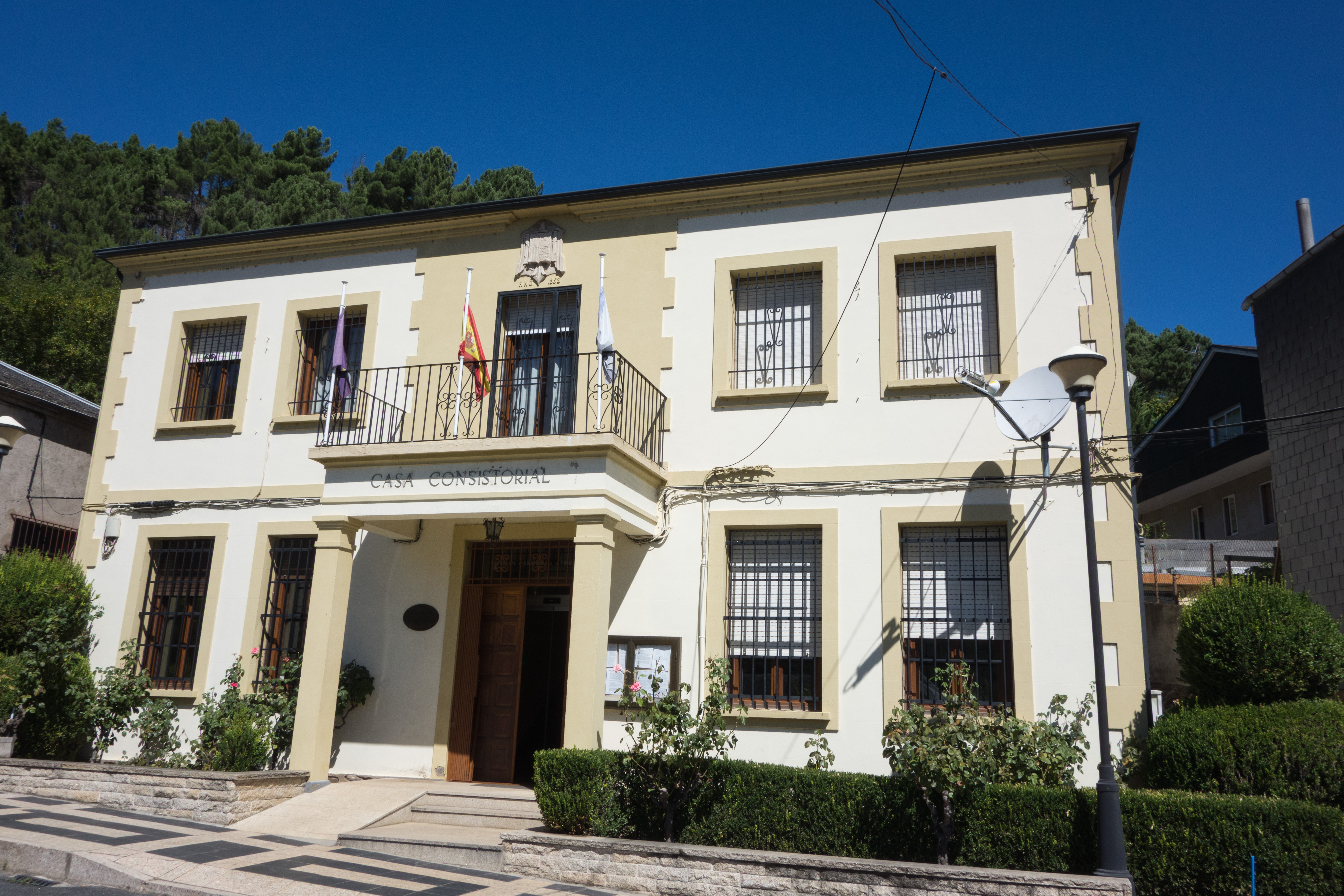 Casa do concello de Carballeda de Valdeorras, provincia de Ourense.